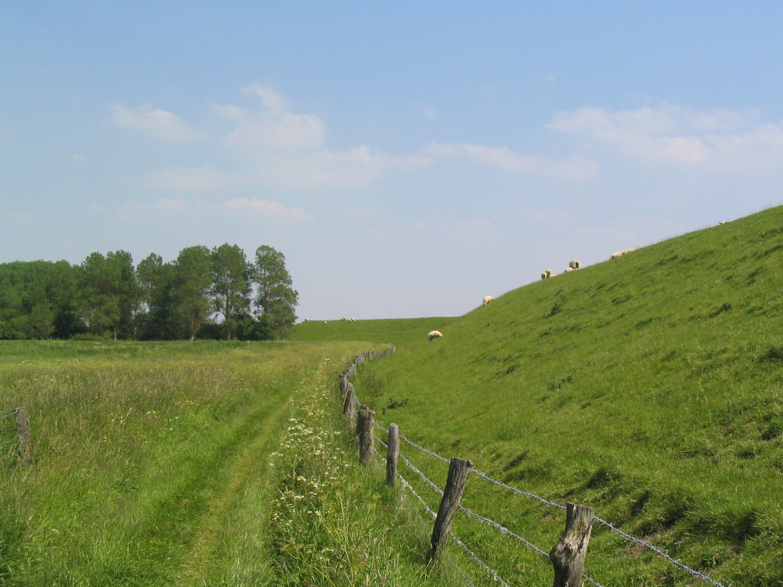 Old dyke in Friedrichsgabekoog